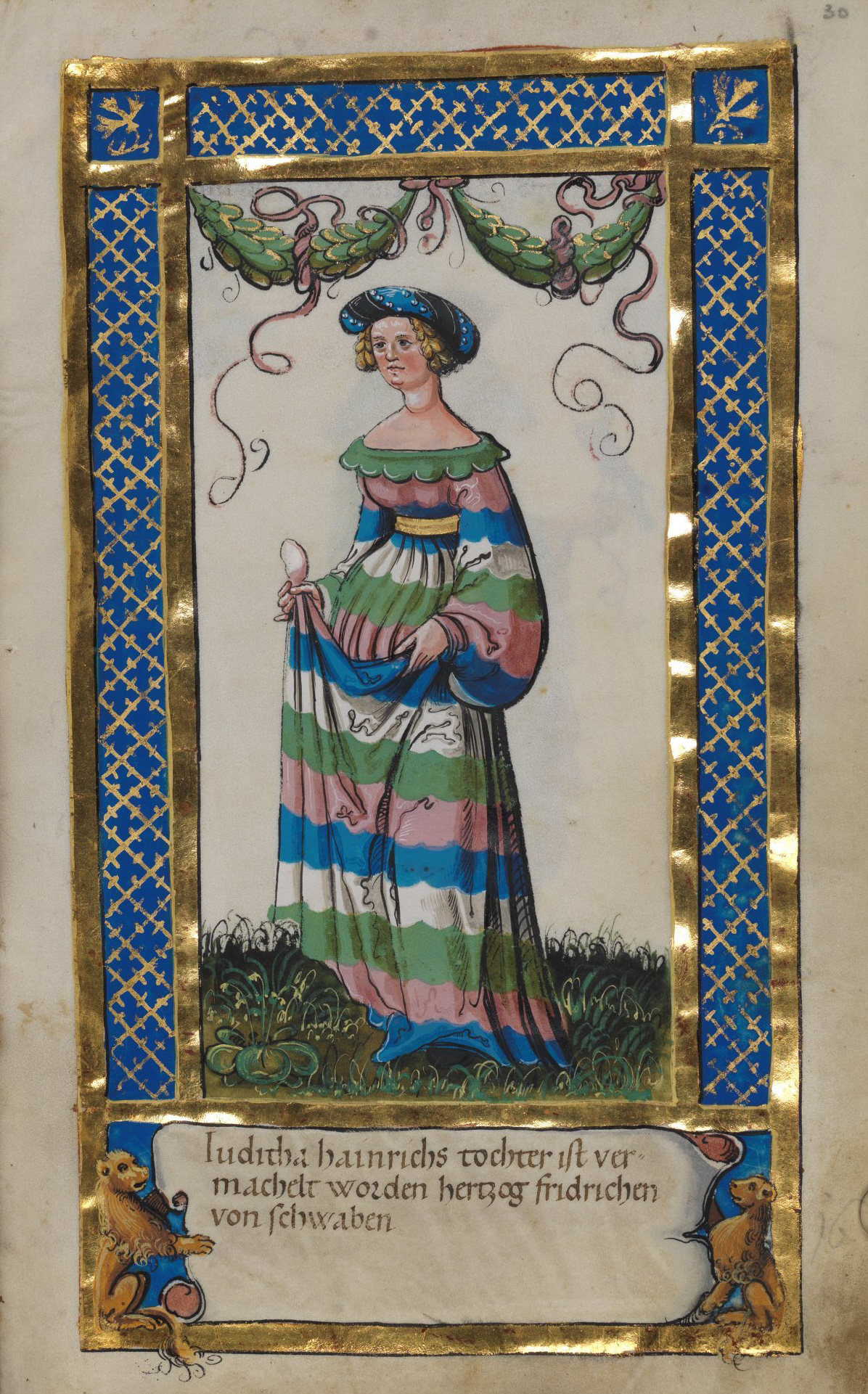 Weingartener Stifterbüchlein, Württembergische Landesbibliothek Stuttgart, Cod.hist.qt.584, fol. 30r, Stifterbild Judith, Tochter des Herzogs Heinrich IX. des Schwarzen, Ehefrau Herzog Friedrichs II. von Schwaben, Mutter des Kaisers Friedrich I. Barbarossa Iuditha hainrichs tochter ist vermachelt worden hertzog fridrichen von schwaben